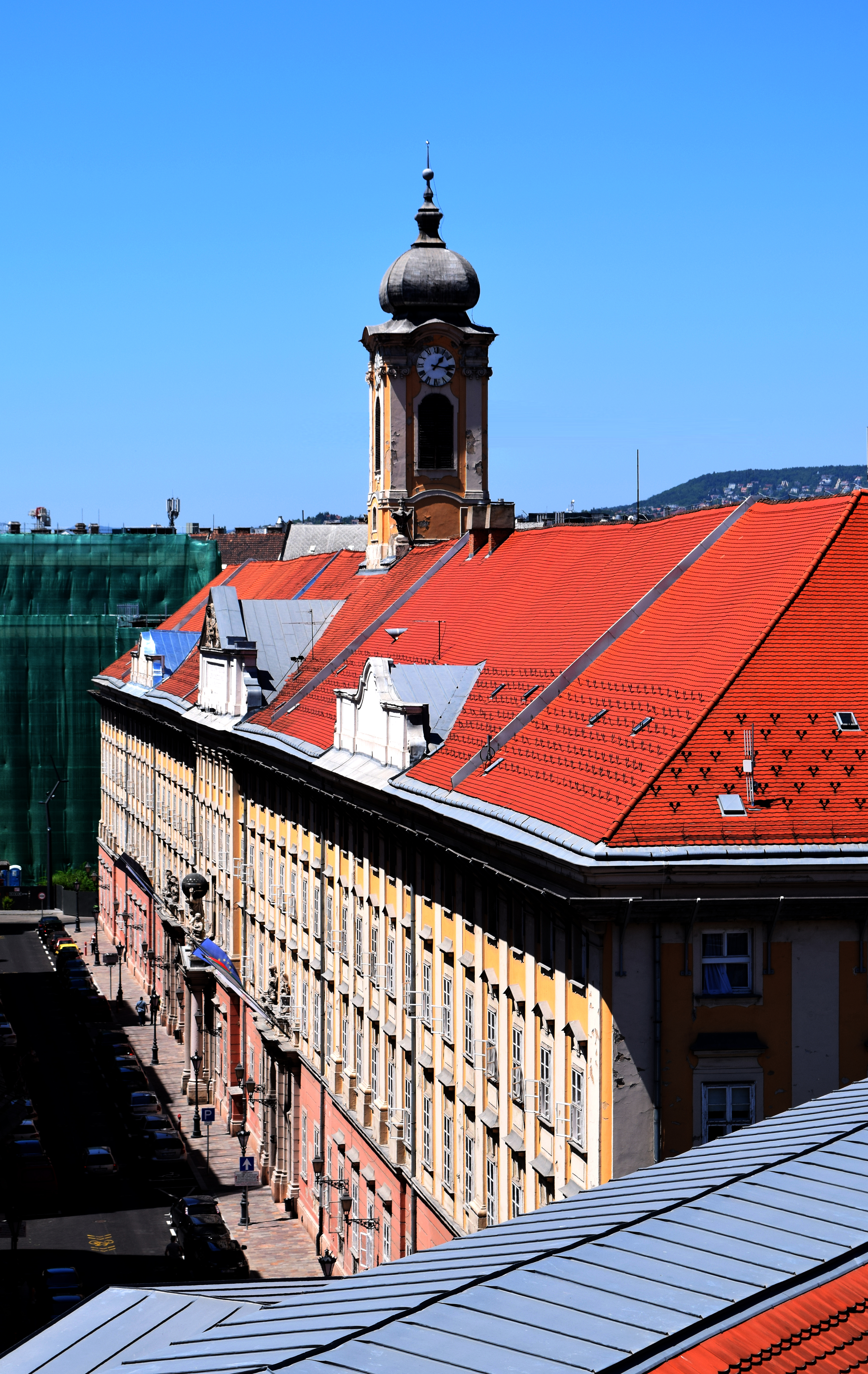 a Központi Városháza a Vármegye utca 3-5.-ből